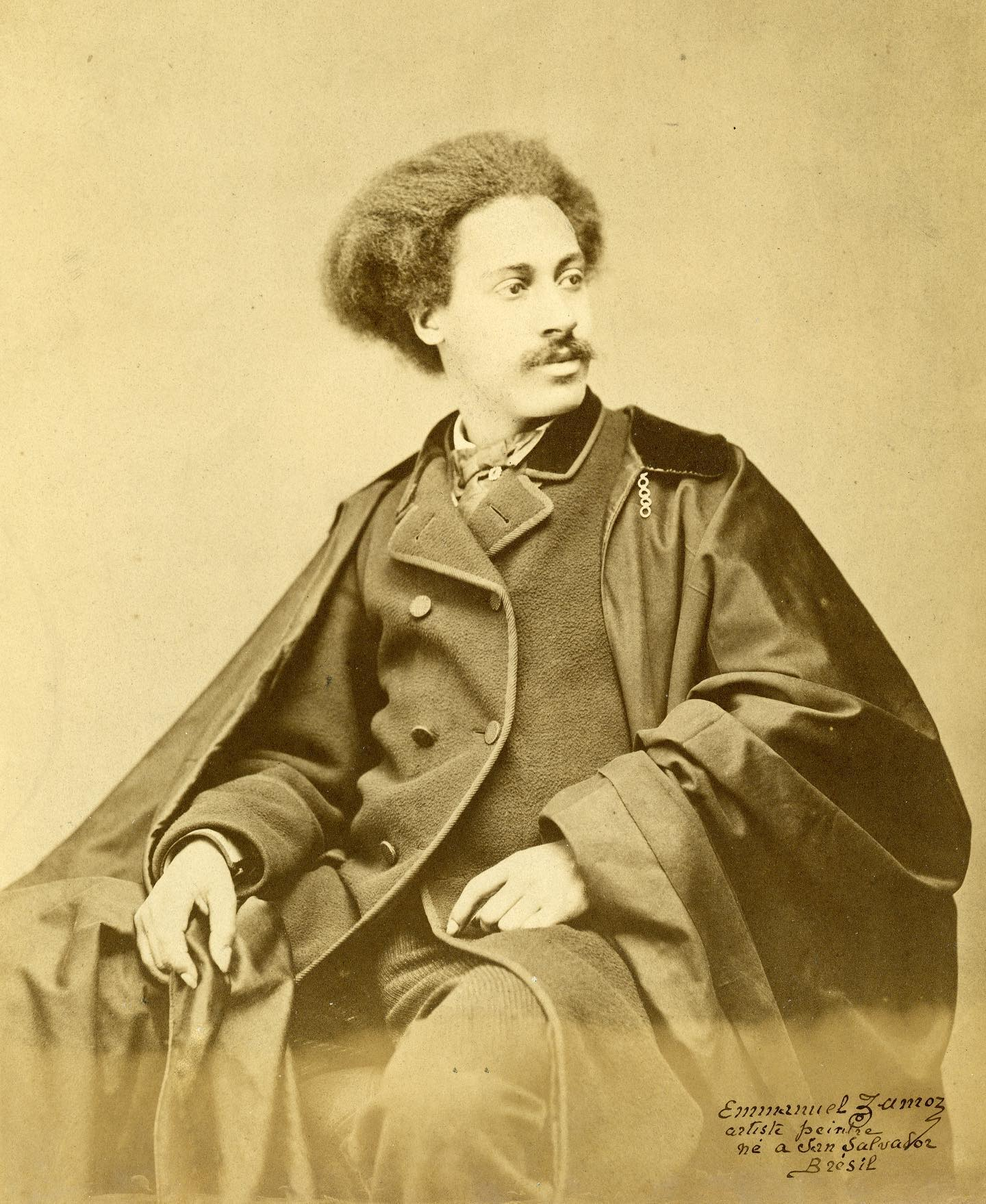 Fotografia de Emmanuel Zamor.